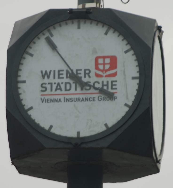 Wiener Würfeluhr zur Anzeige der Normalzeit, Zifferblatt als Werbefläche der Wiener Städtischen Versicherung